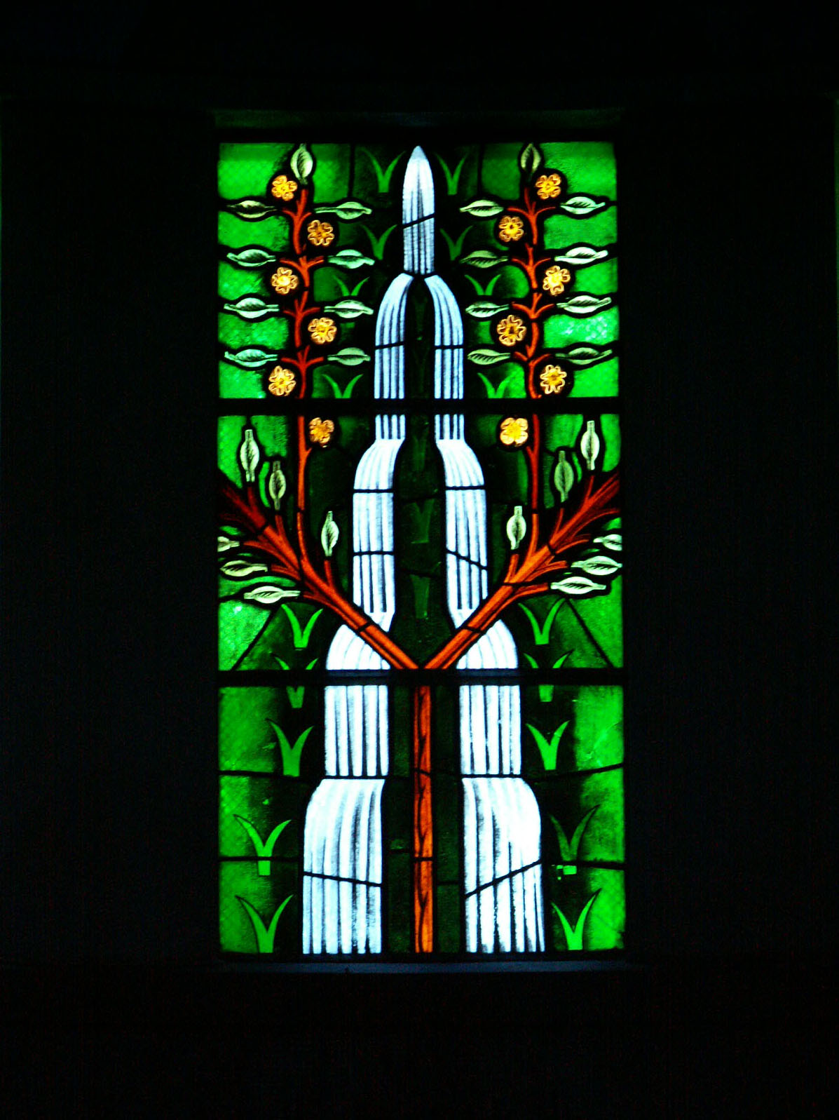 autor dos vitrais: Almada Negreiros This file was uploaded for Wiki Loves Monuments in Portugal with the unique identifier 74184.